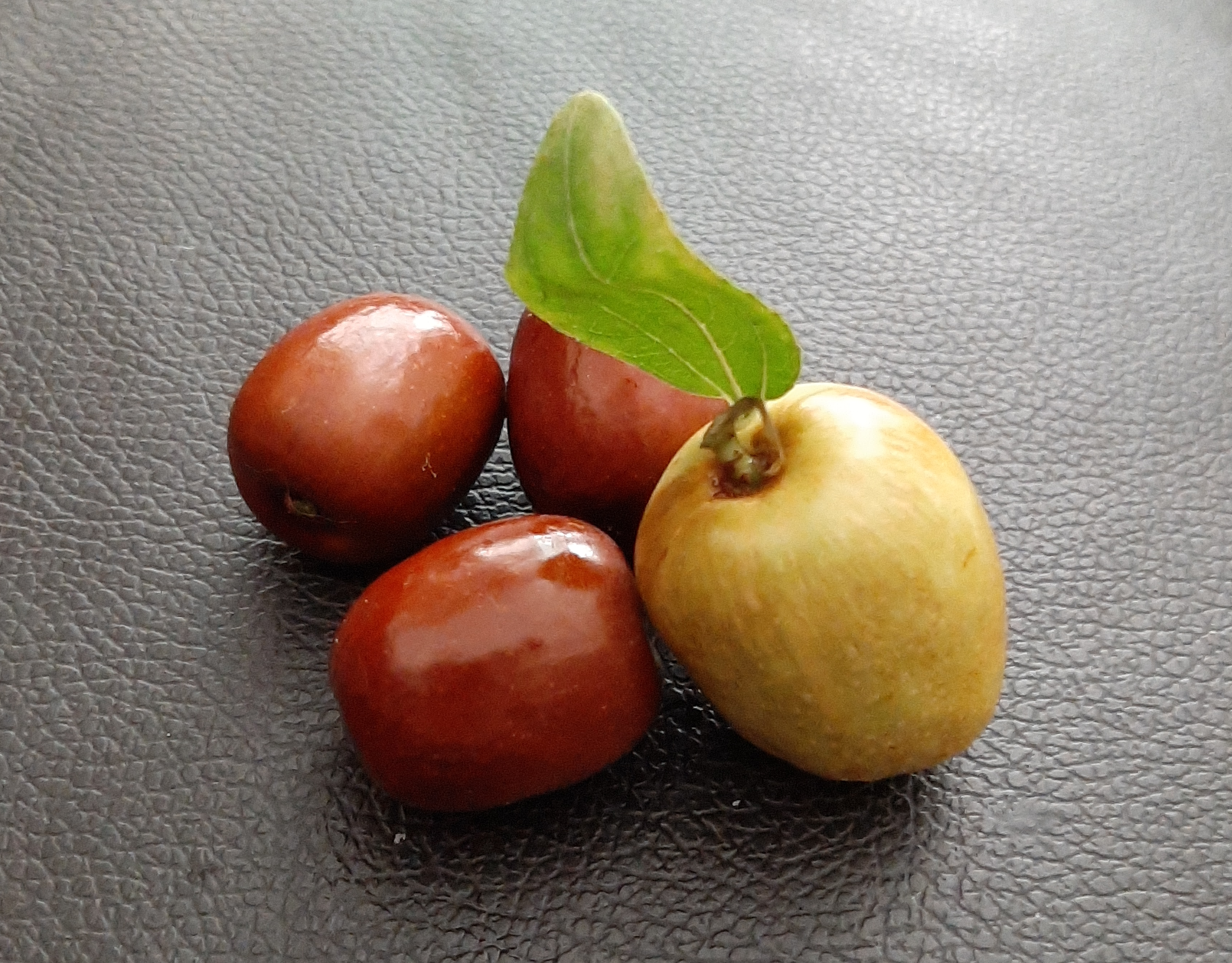 Fruit de jujuba